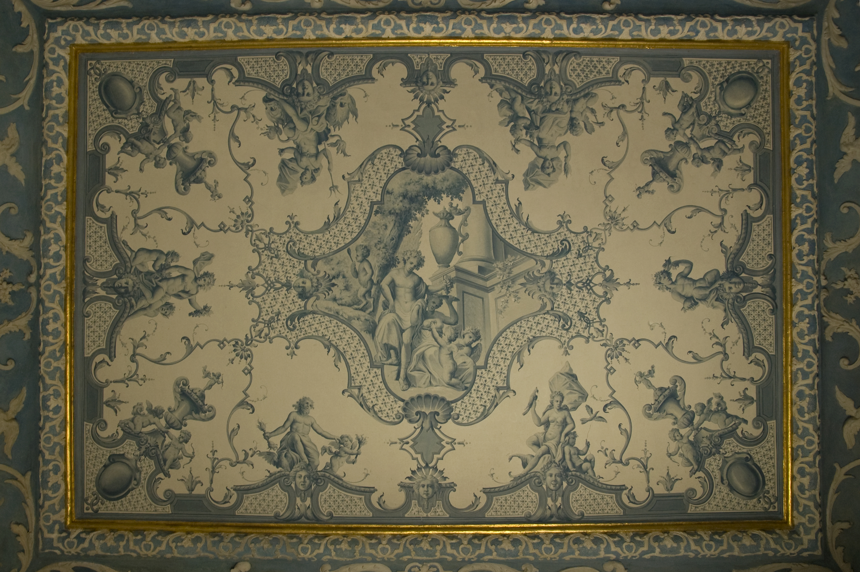 Schlosspark Nymphenburg - Pagodenburg, Deckenfresko im Eingangsbereich - von Johann Anton Gumpp